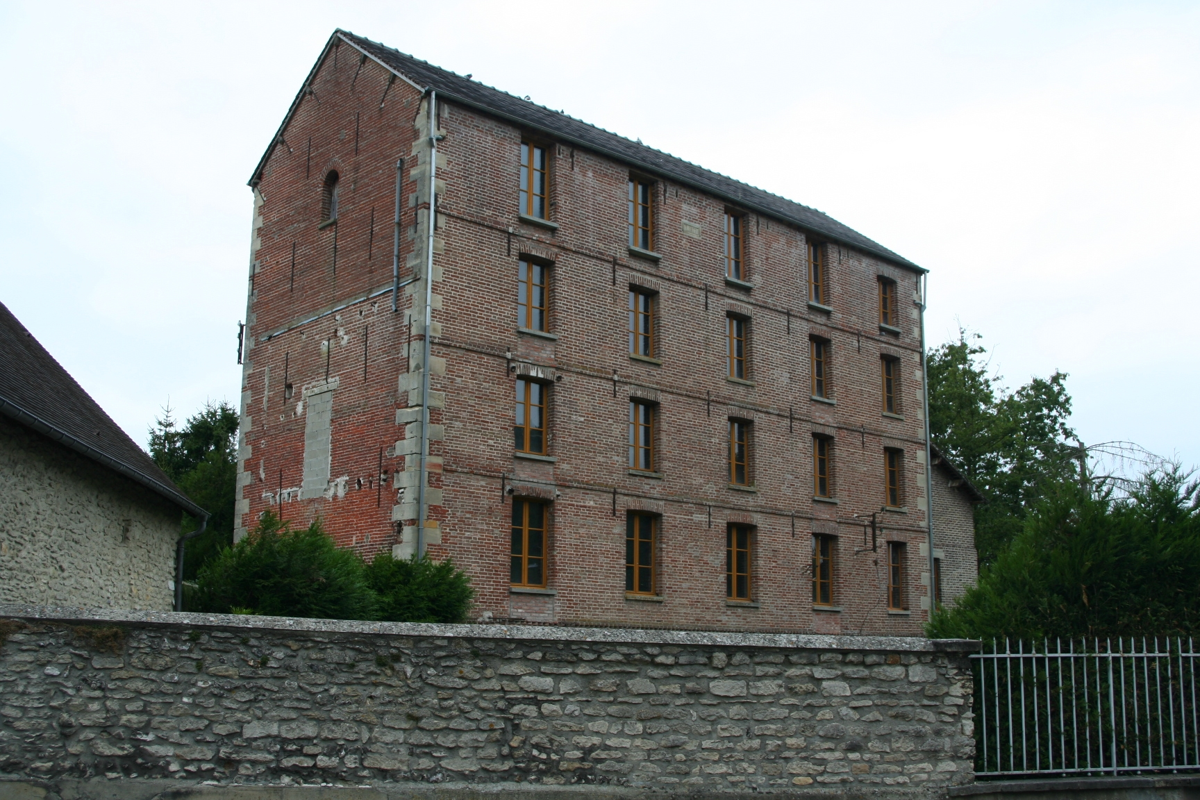 Ancien moulin à Roconval, commune d'Amenucourt - Val-d'Oise, France